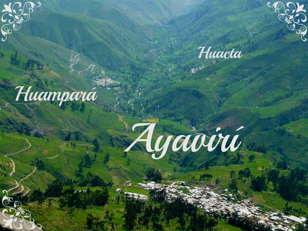 Hermoso valle de Ayavirí, Huampará y Huacta (Quinches) en la zona Nor oeste de la provincia de Yauyos.